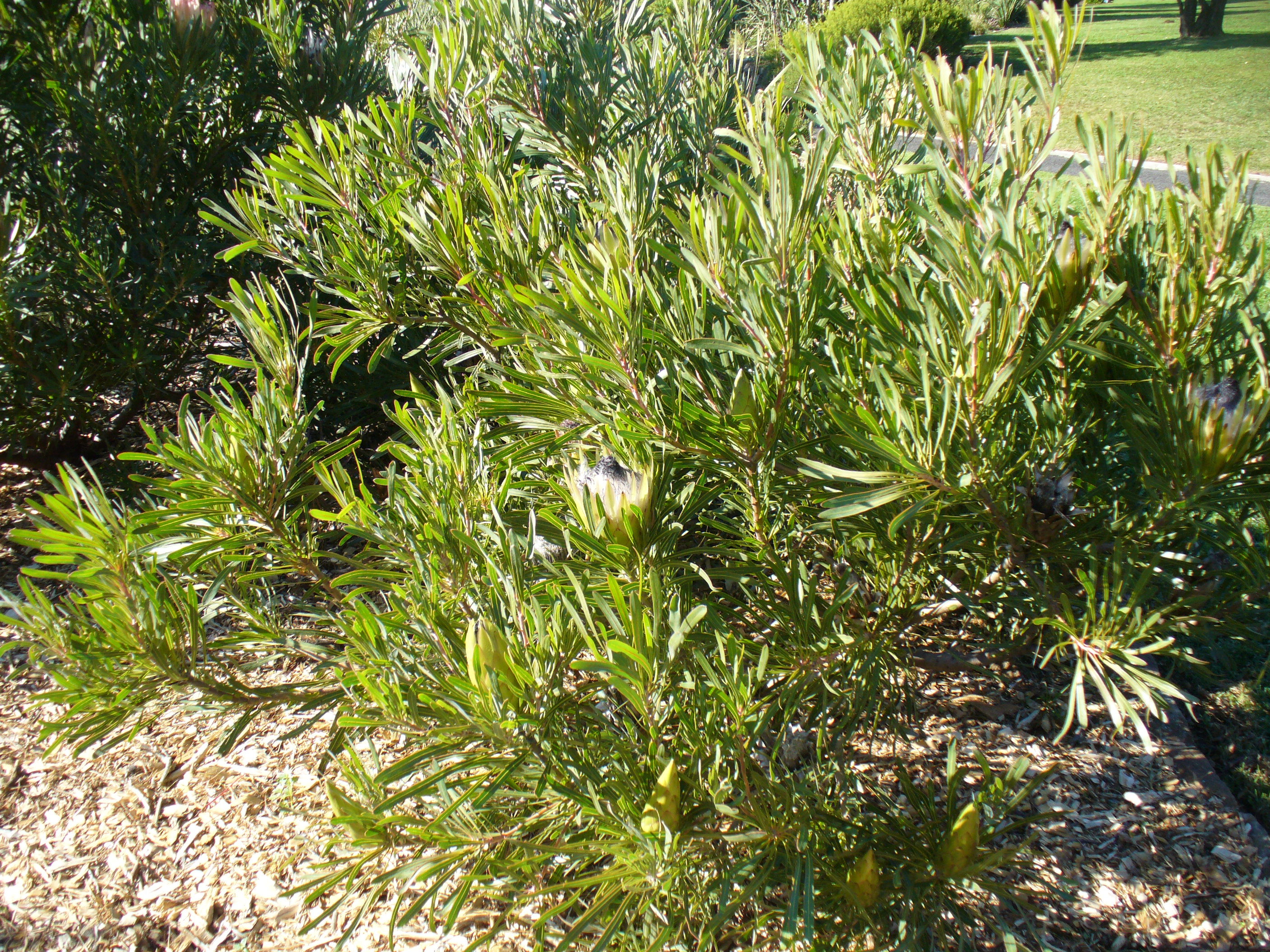 Kirstenbosch Gardens Cape Town